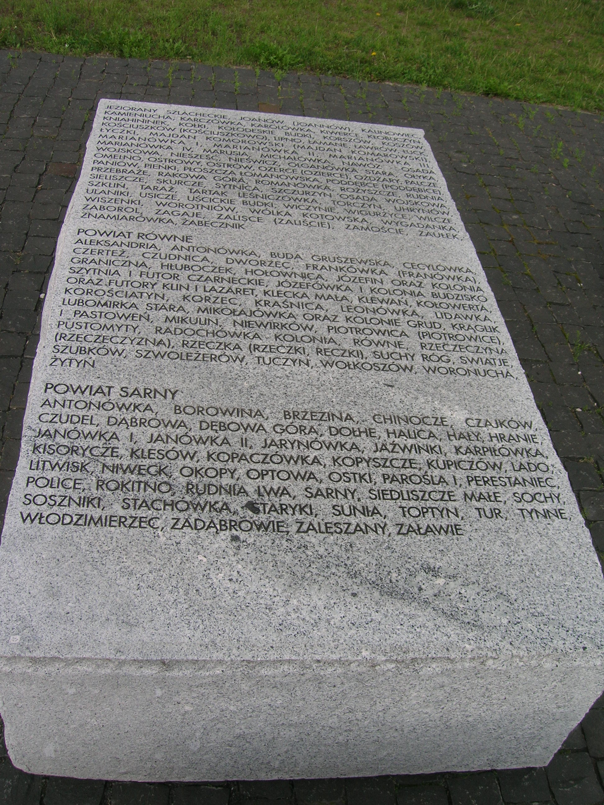 tablica IV woj. wołyńskie